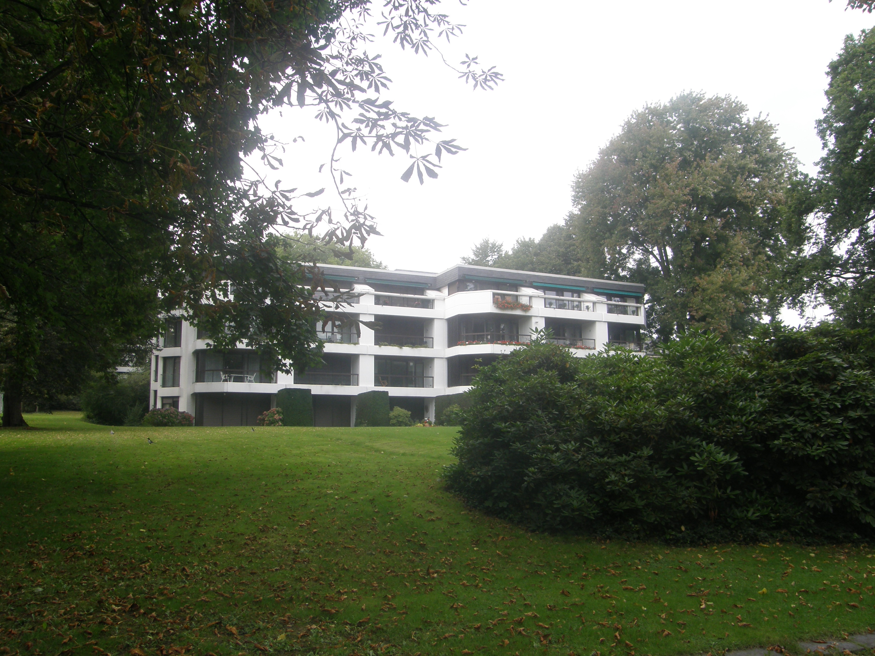 harvestehuder weg hamburg